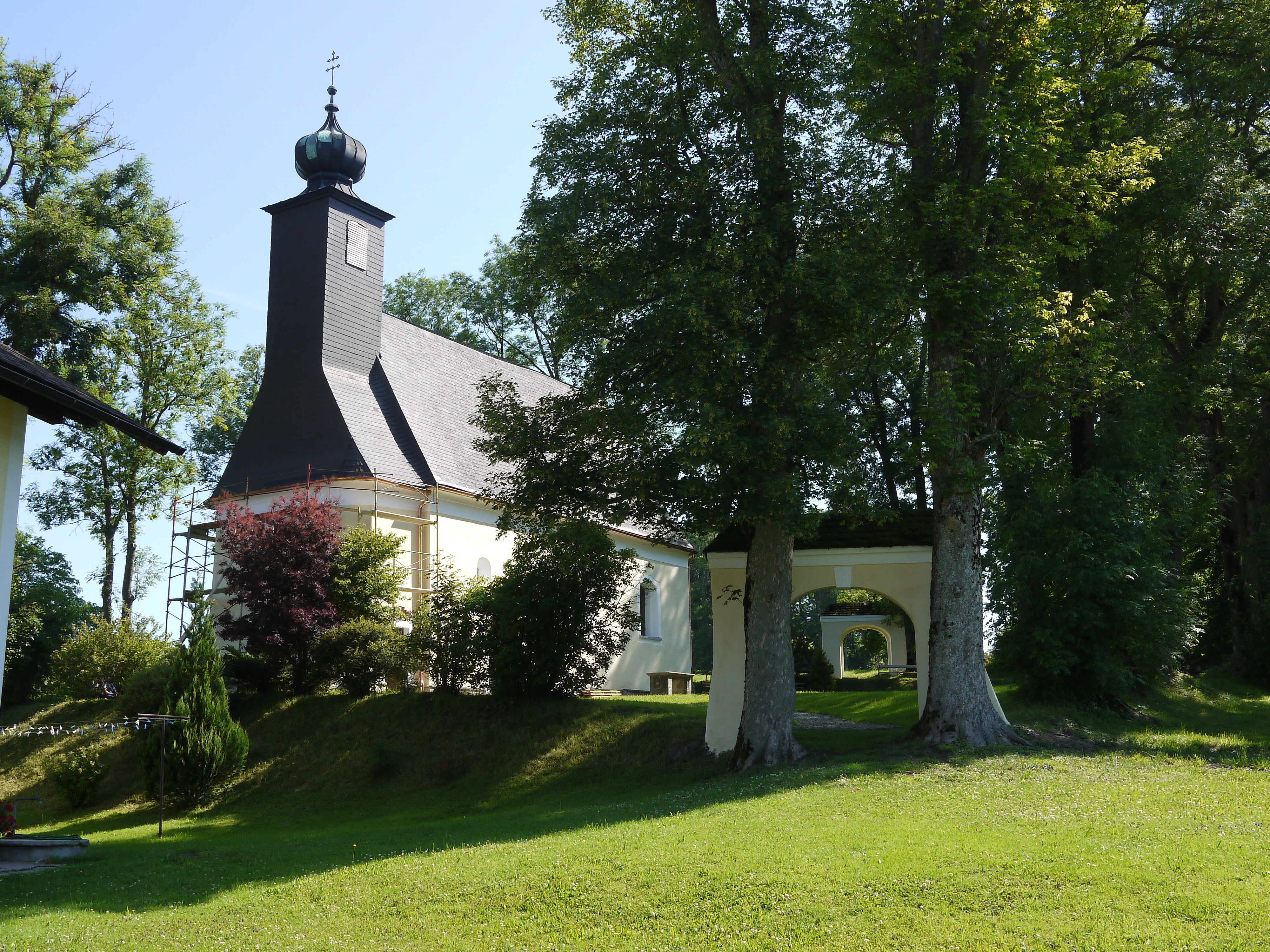 Kath. Filialkirche hll. Peter und Paul und ehem. Friedhofsfläche